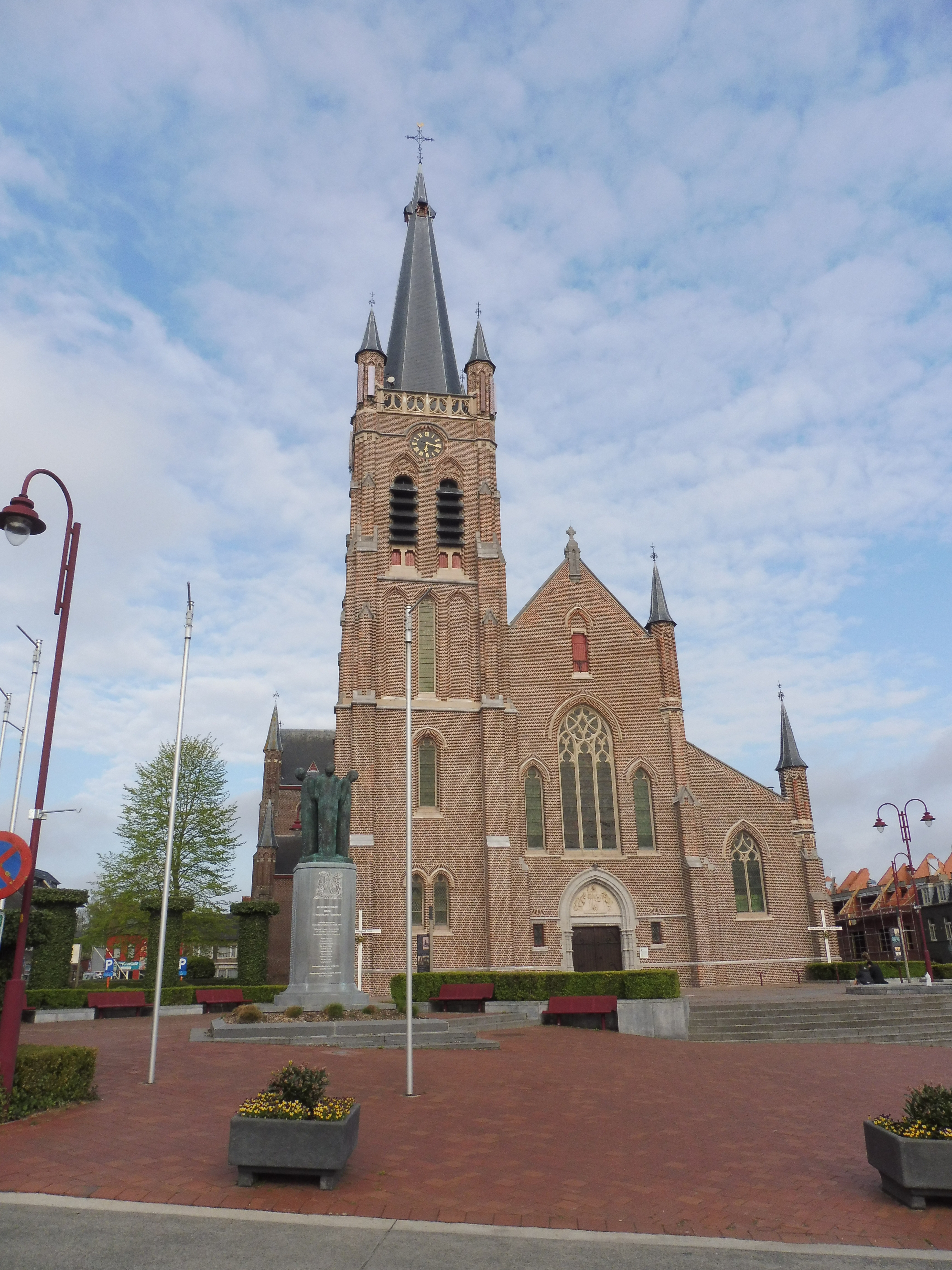 Zicht op de Sint-Jacobuskerk in Lichtervelde vanop de Marktplaats. Op het plein voor de kerk is het Vredesmonument te zien.